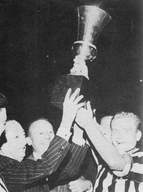 Milano, stadio San Siro, 18 settembre 1960. Il capitano della Juventus, Giampiero Boniperti (a destra), riceve e solleva il trofeo della Coppa Italia 1959-60 al termine della vittoriosa finale sulla Fiorentina (3-2 d.t.s.).